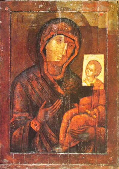 Богоматерь Одигитрия (Двусторонняя икона, на обороте Святой Георгий). Успенский cобор Московского Кремля, Москва, Россия